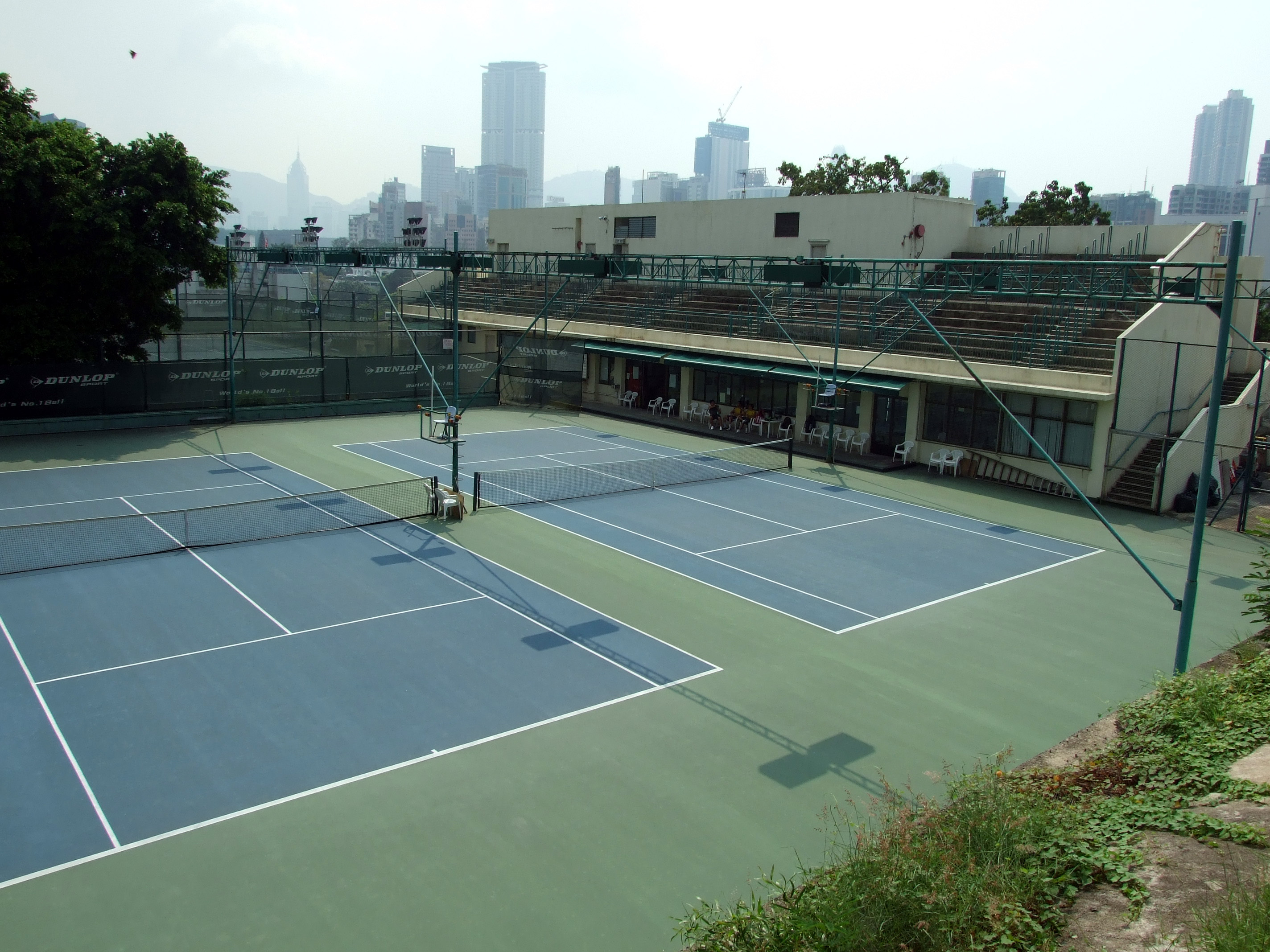 中文（香港）: 南華體育會京士柏網球中心全天候網球場